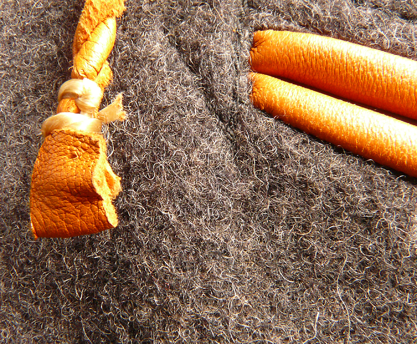 Vadmal-Walkstoff in sechsfacher Vergrößerung